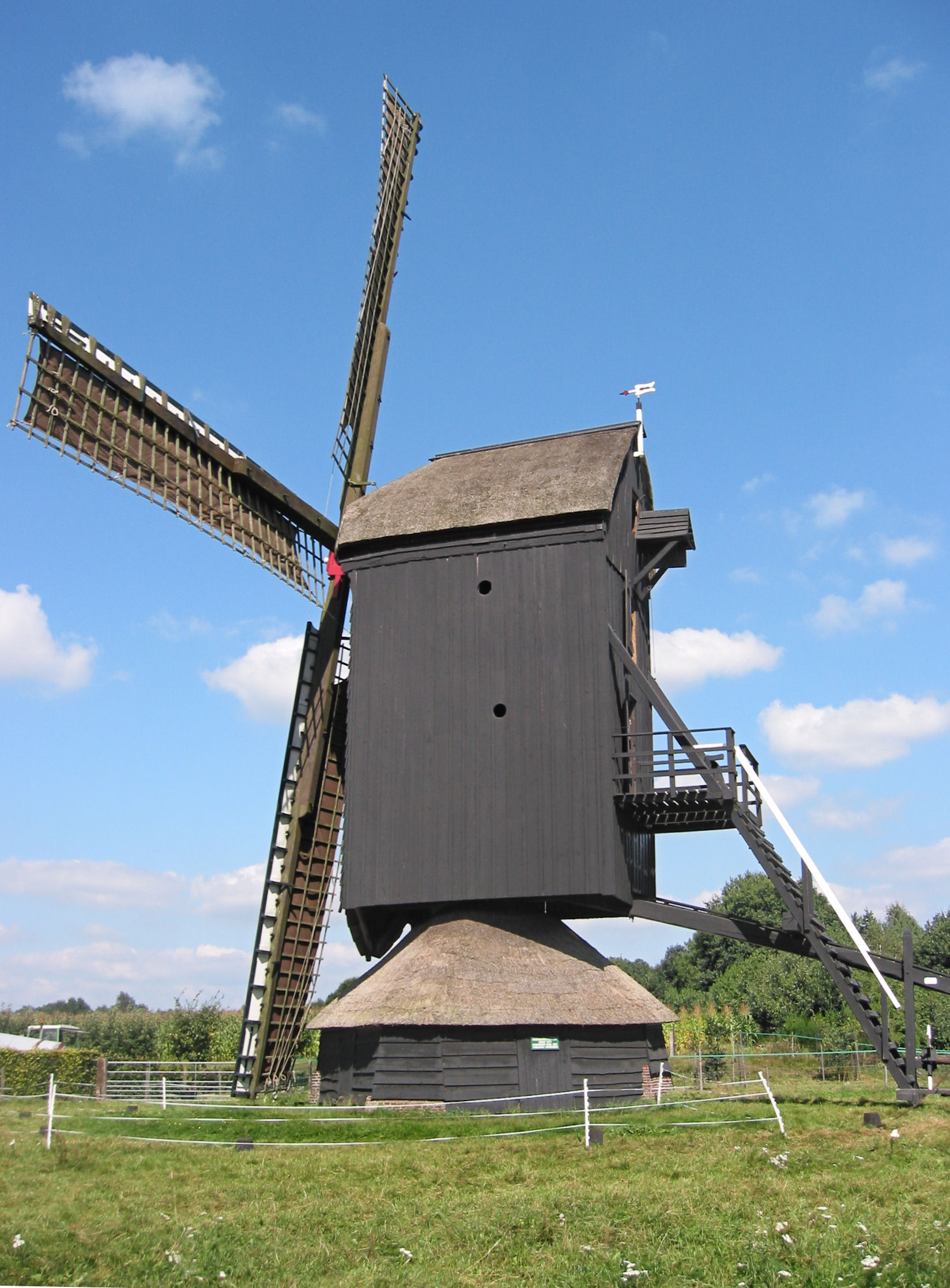 Doesburgermolen te Ede 11 augustus 2007